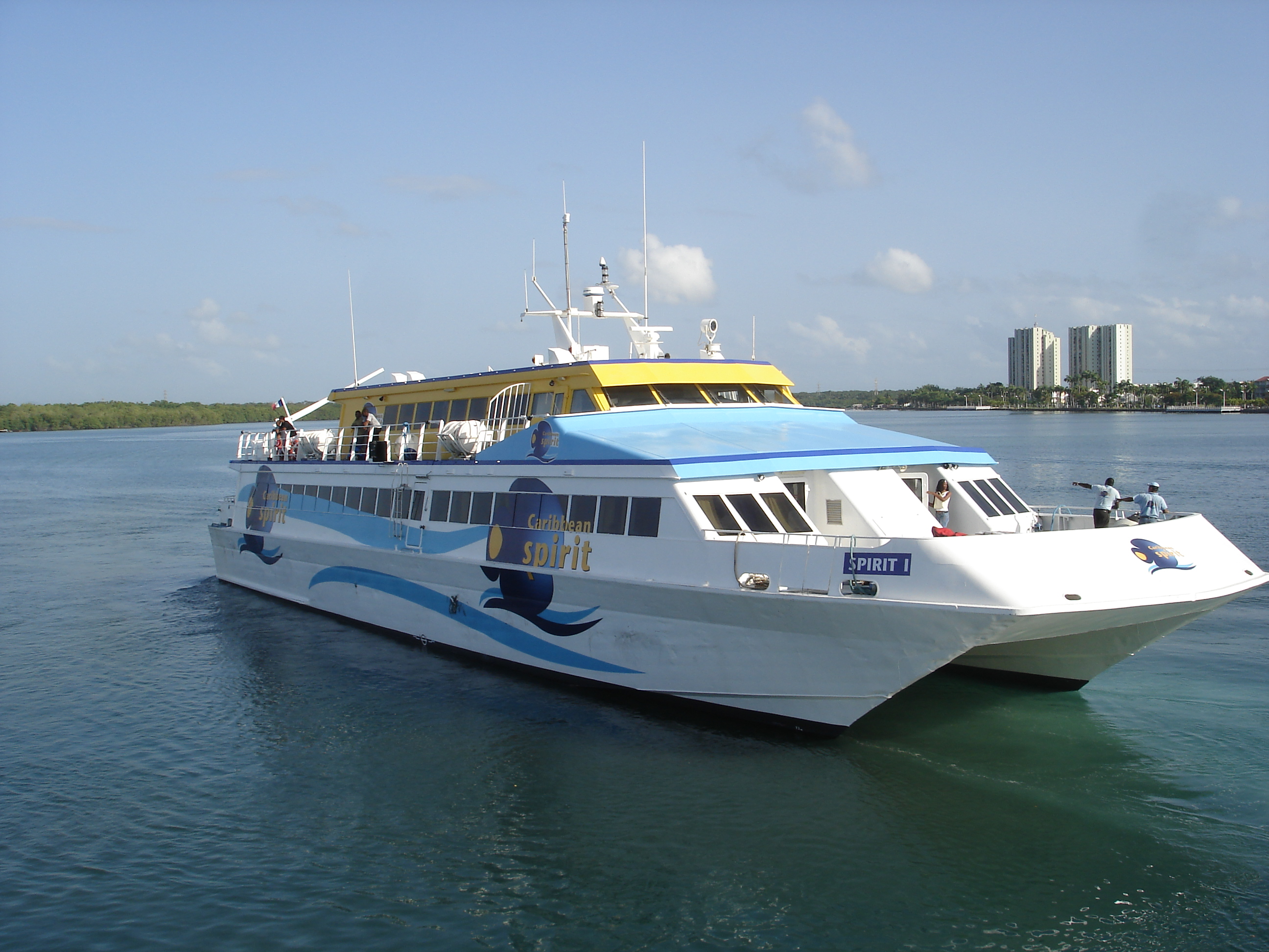 Catamaran assurant la liaison maritime "guadeloupe-marie-Galante" (Guadeloupe - France